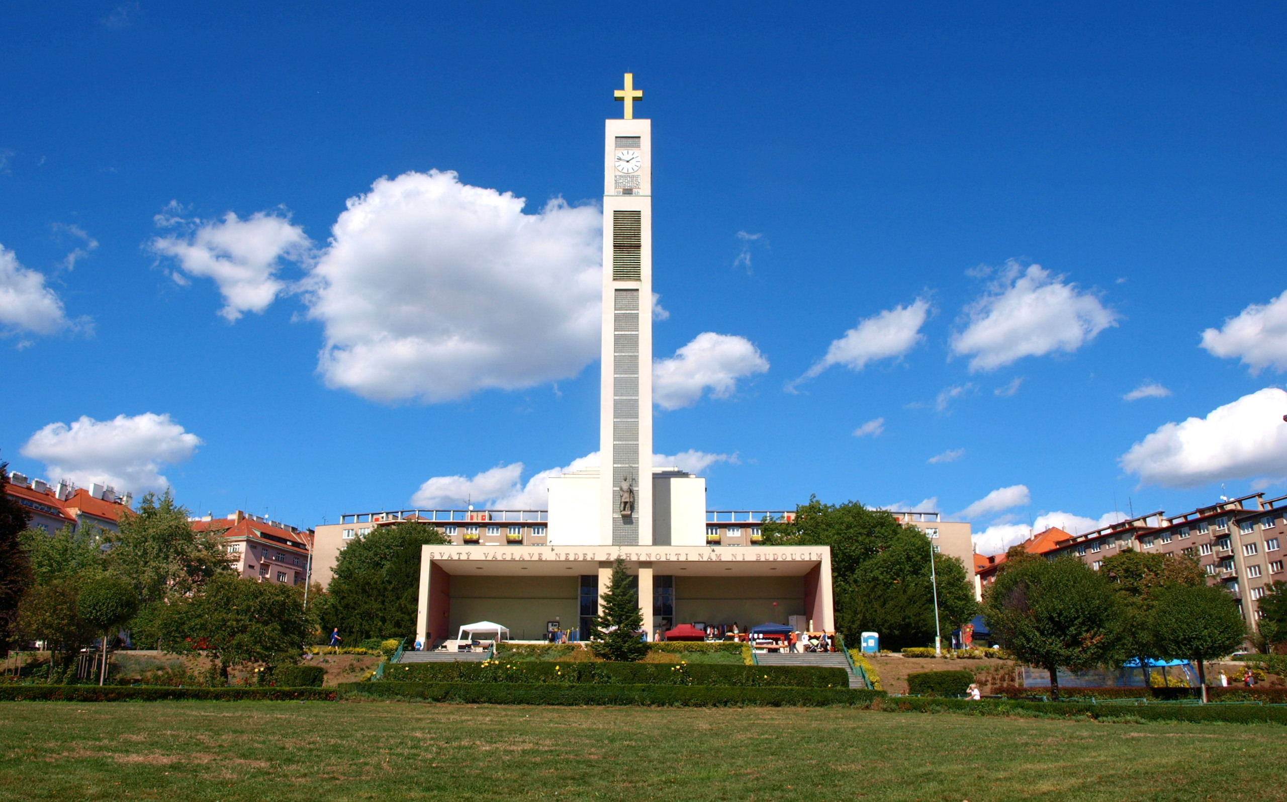 Náměstí Svatopluka Čecha